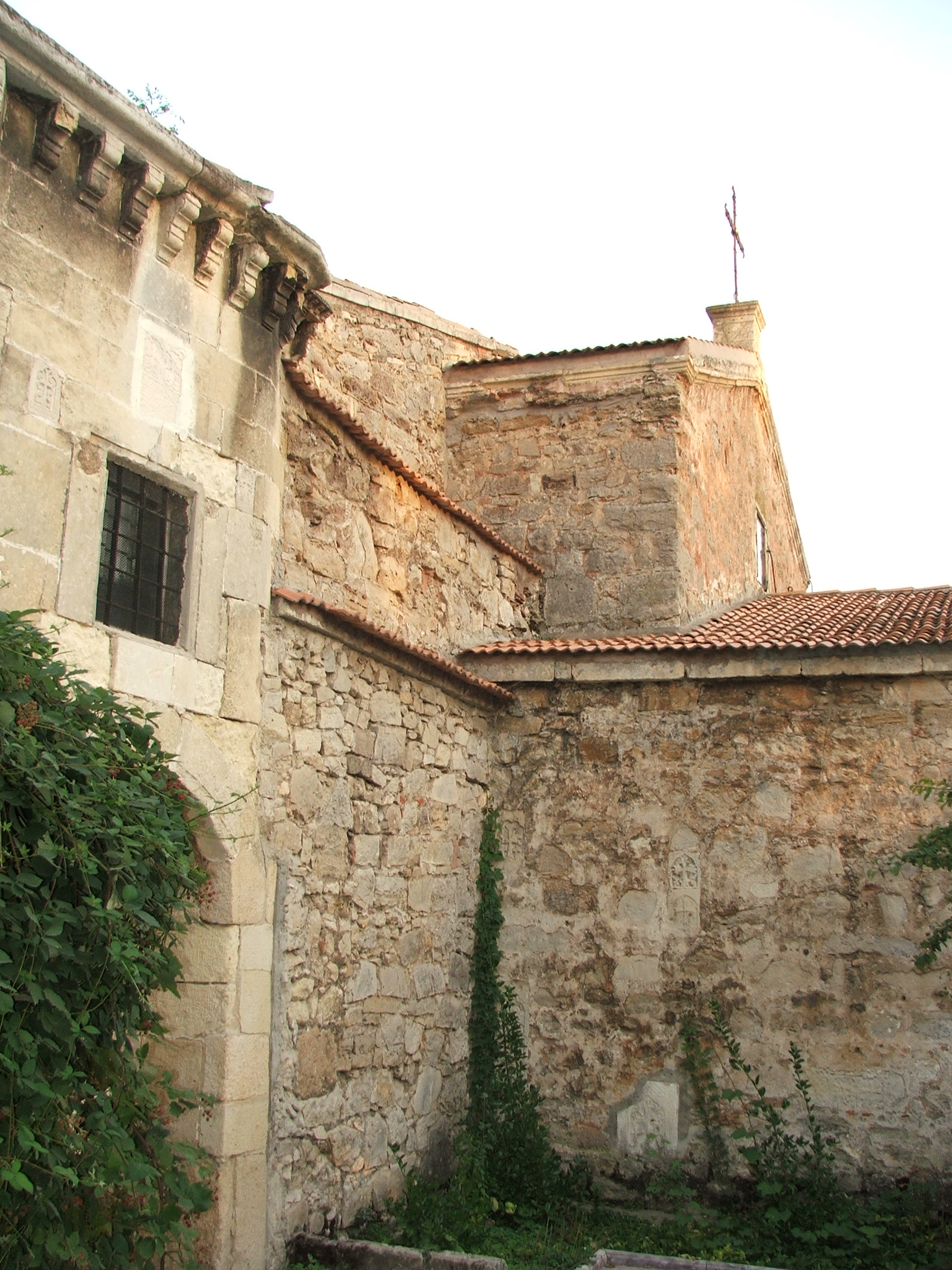 Вірмено-григоріанська церква Св. Сергія, Феодосія, на перетині вулиць Леніна, пров. Айвазовського, 2, і Морської, 2